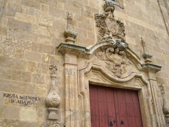 Portada de la iglesia del Carmen de Abajo. Salamanca.